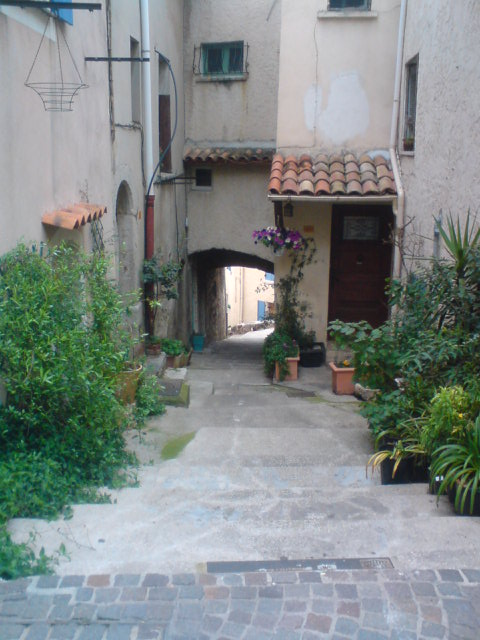 chemin de la vielle ville de La Garde